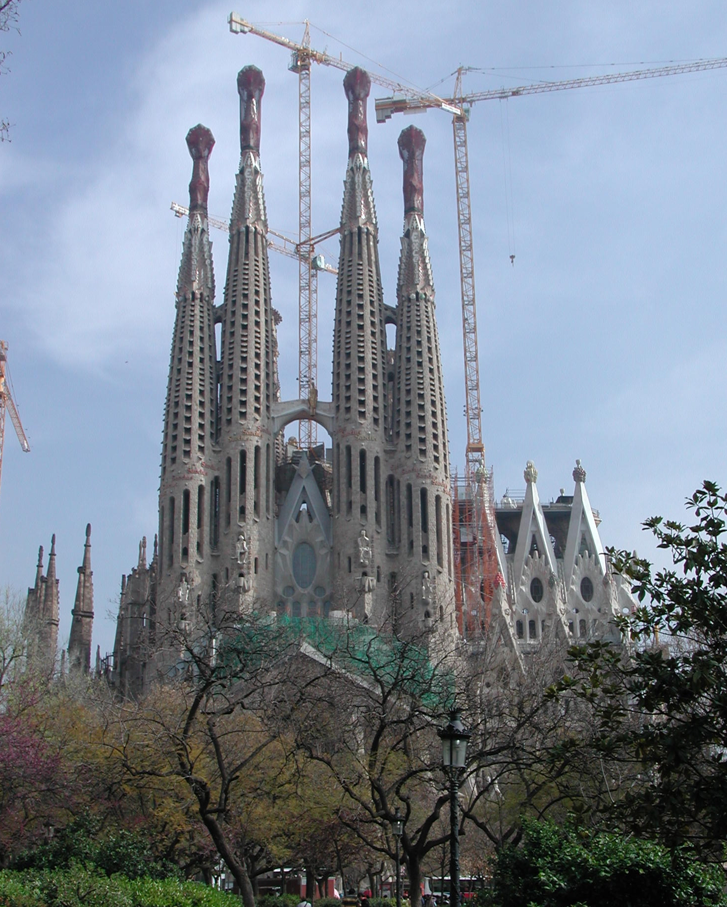 Sagrada Familia, Barcelona